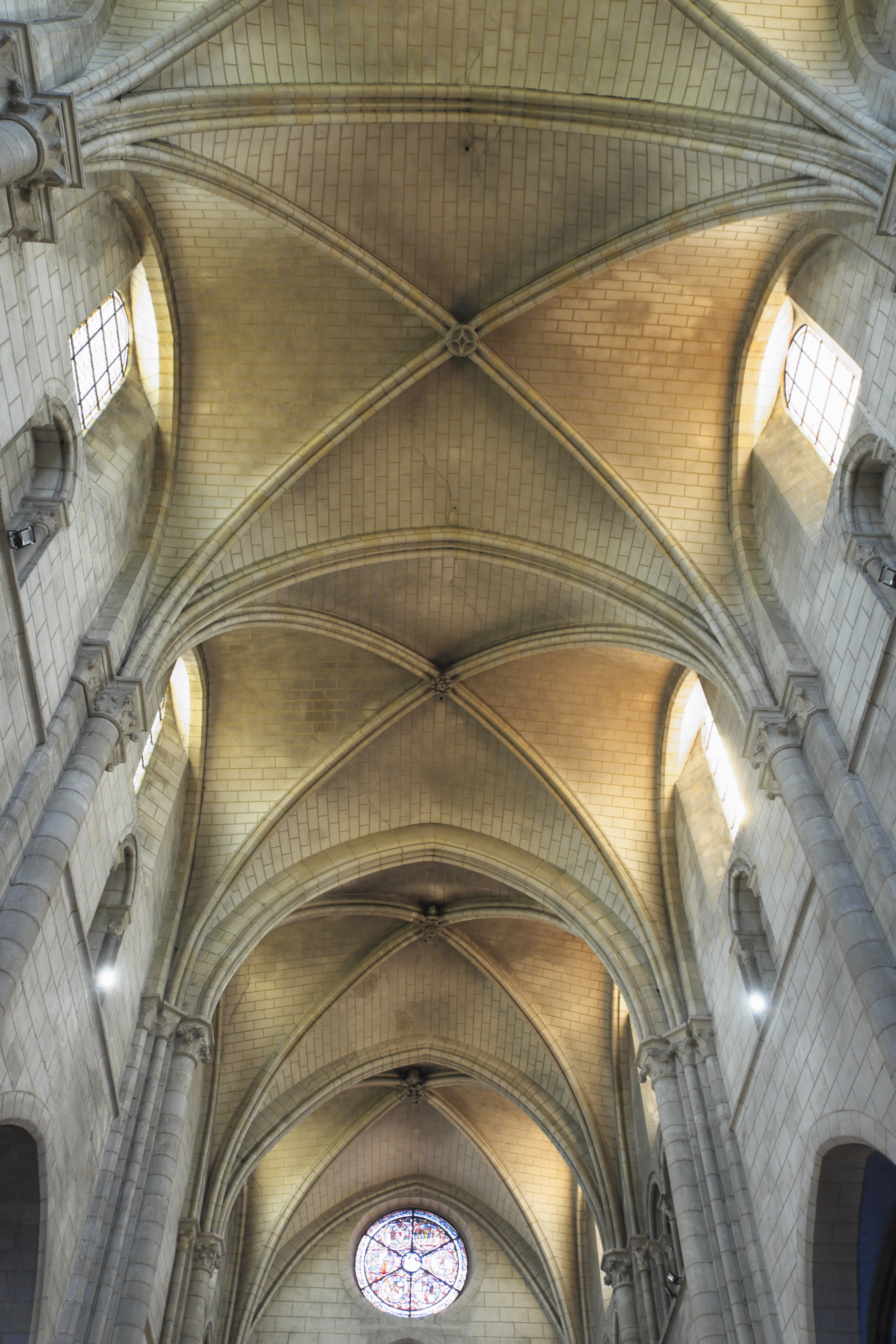 Katholische Pfarrkirche Saint-Vincent-Saint-Germain in Saint-Germain-lès-Corbeil im Département Essonne (Region Île-de-France/Frankreich), Gewölbe